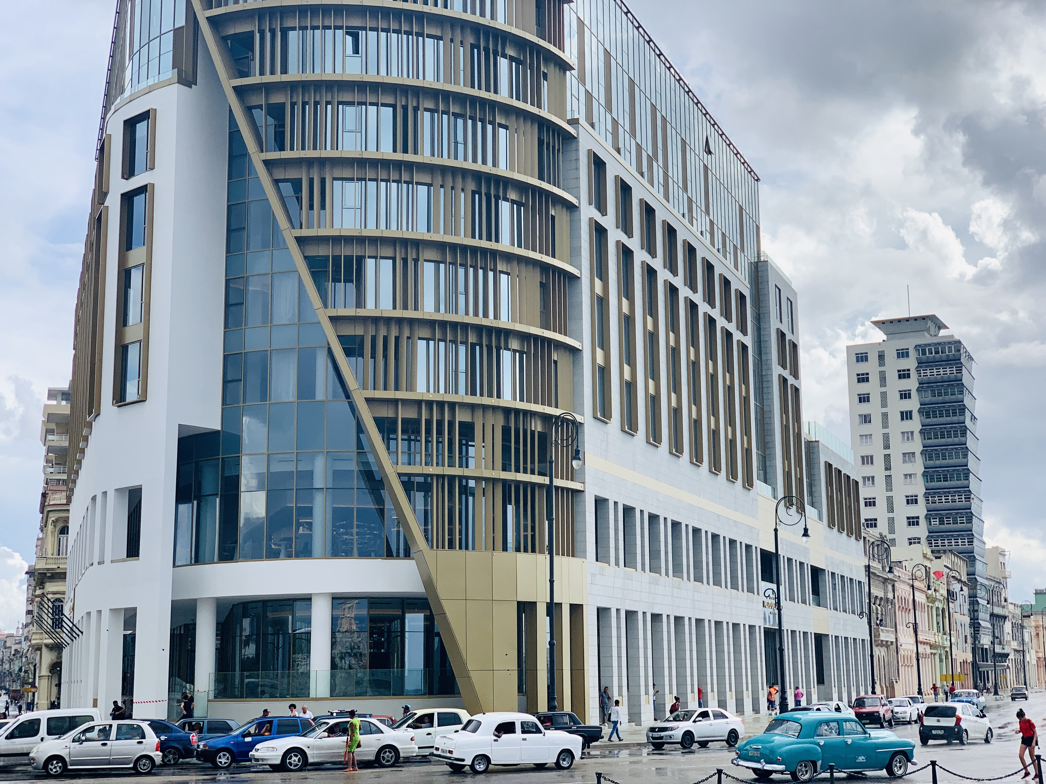 Edificios en el Malecon de La Habana